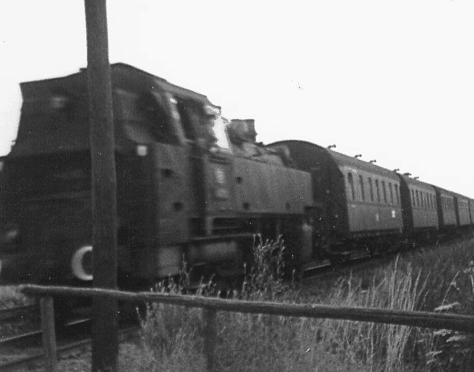 Personenzug mit Dampflok 86 auf der Strecke Coburg-Neustadt am Bahnübergang Coburg, Kalenderweg.